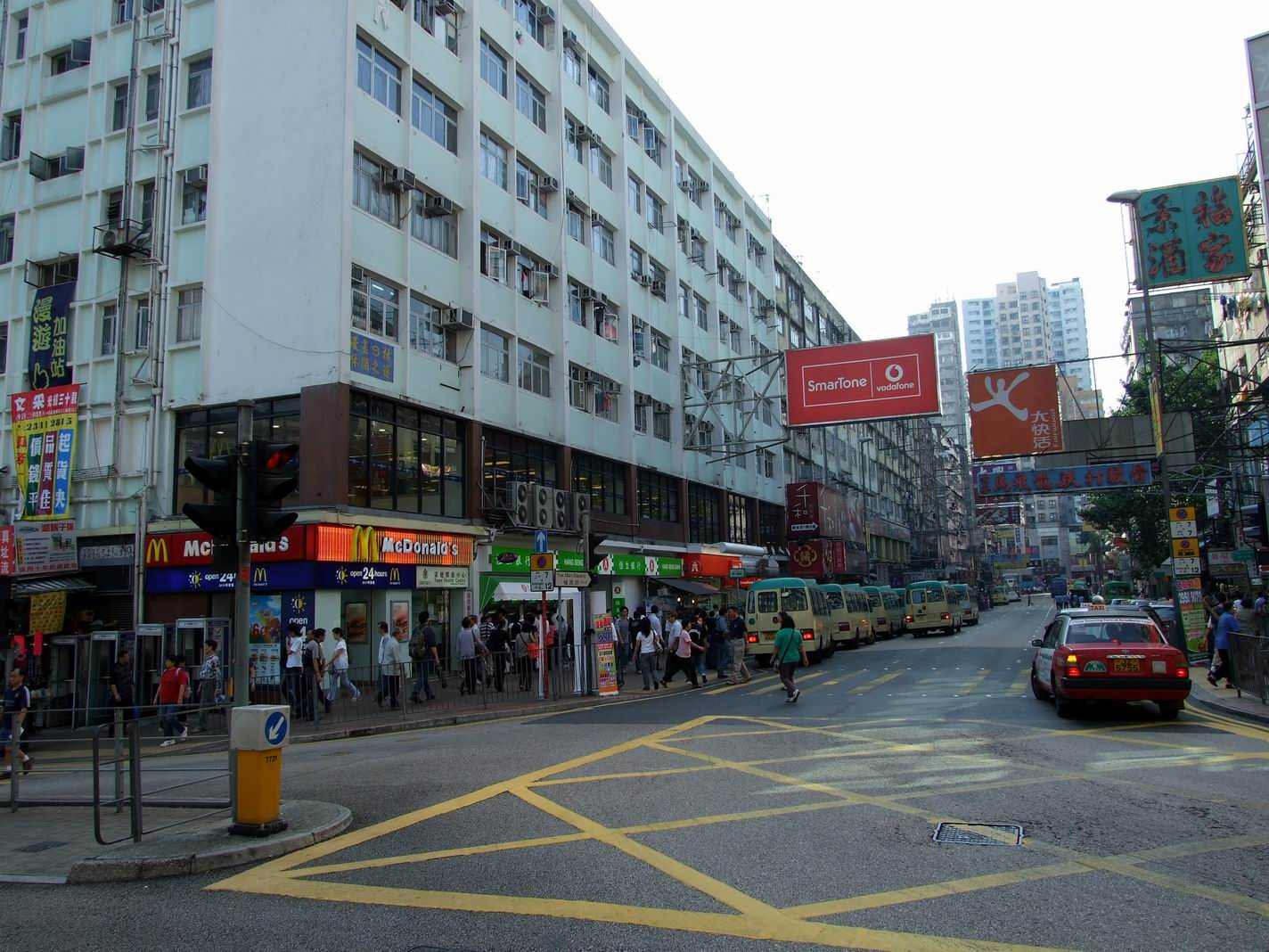 裕民坊